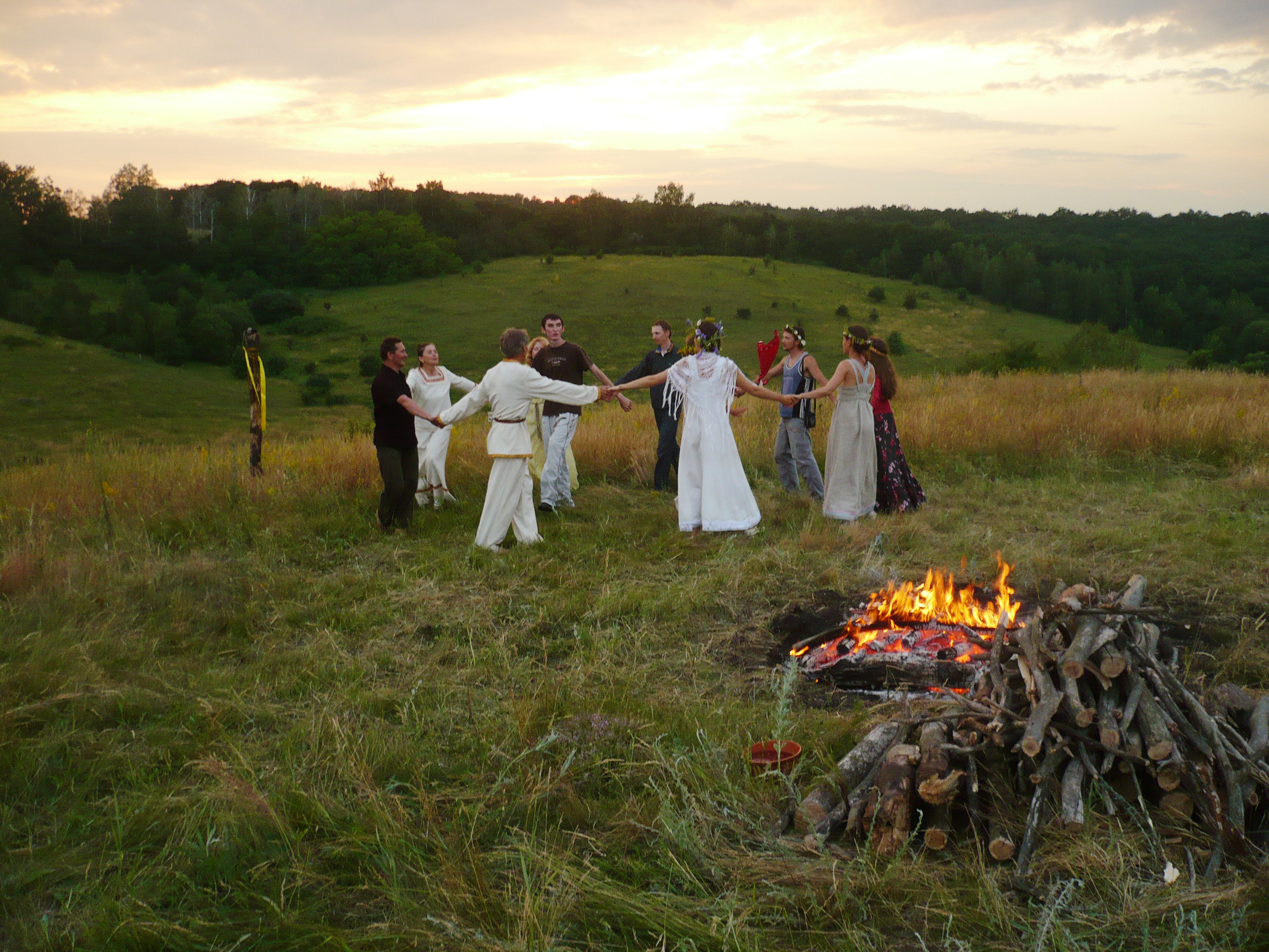 Праздник Иван Купала в Белгородской области. 2011